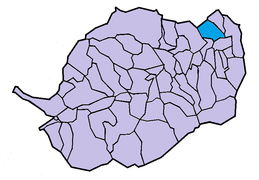 Arboçols en el Conflent, a partir del mapa municipal del Conflent de lliure disposició adaptat al Nomenclàtor toponímic aprovat el 2007